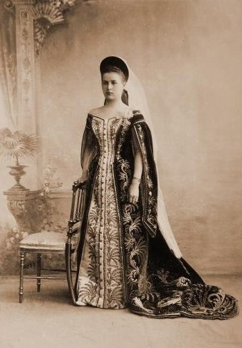 Княжна Ольга Николаевна Репнина-Волконская, в замужестве герц. Лейхтенбергская (1872—1953).